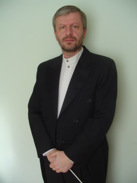 Zdzisław Czarnecki. To jest zdjęcie zrobione 27 stycznia 2008.